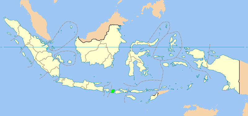 Peta provinsi Lombok, Indonesia